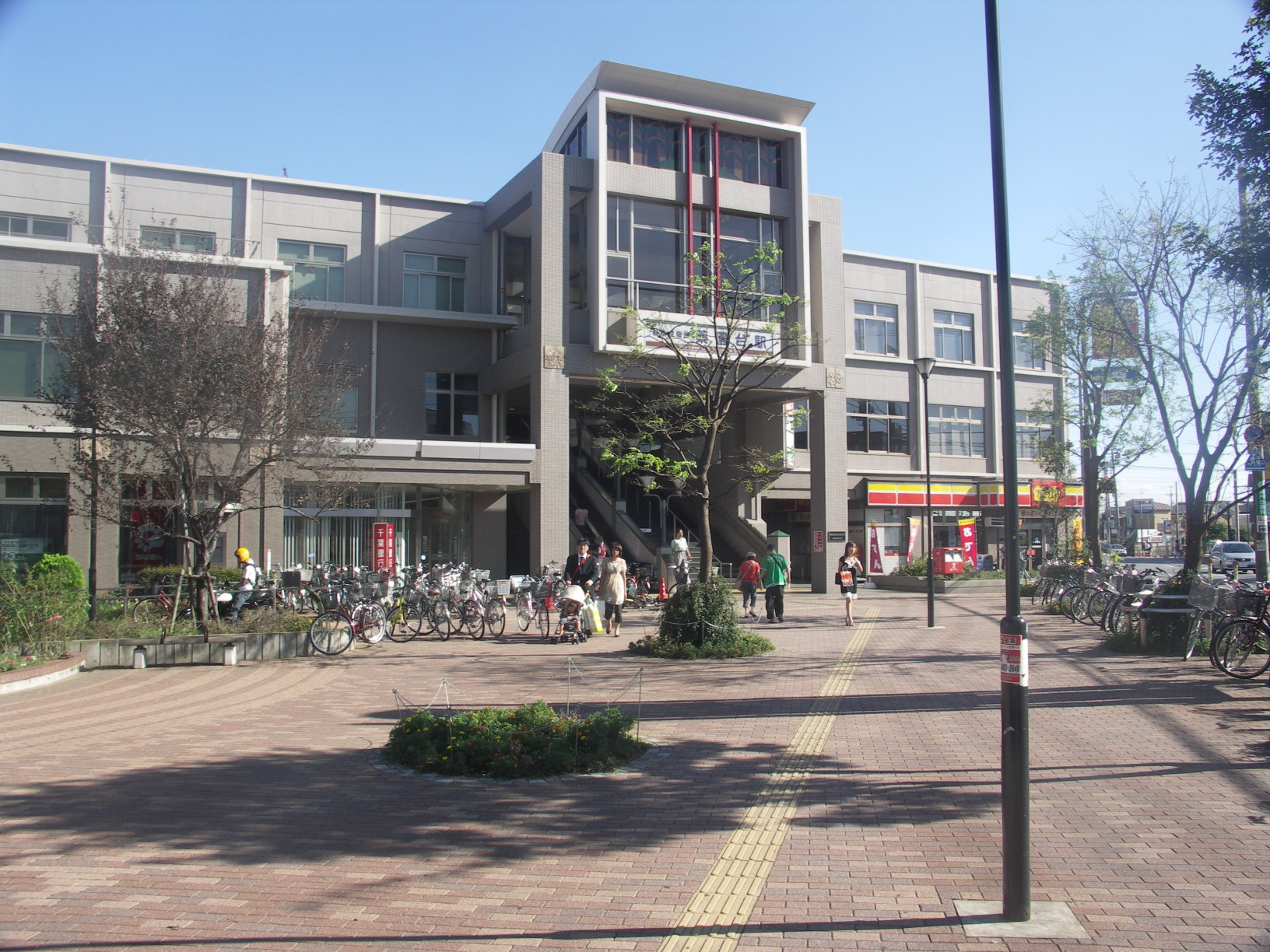 Yakuendai station, Shin-Keisei Line, Chiba, Japan, 薬園台駅